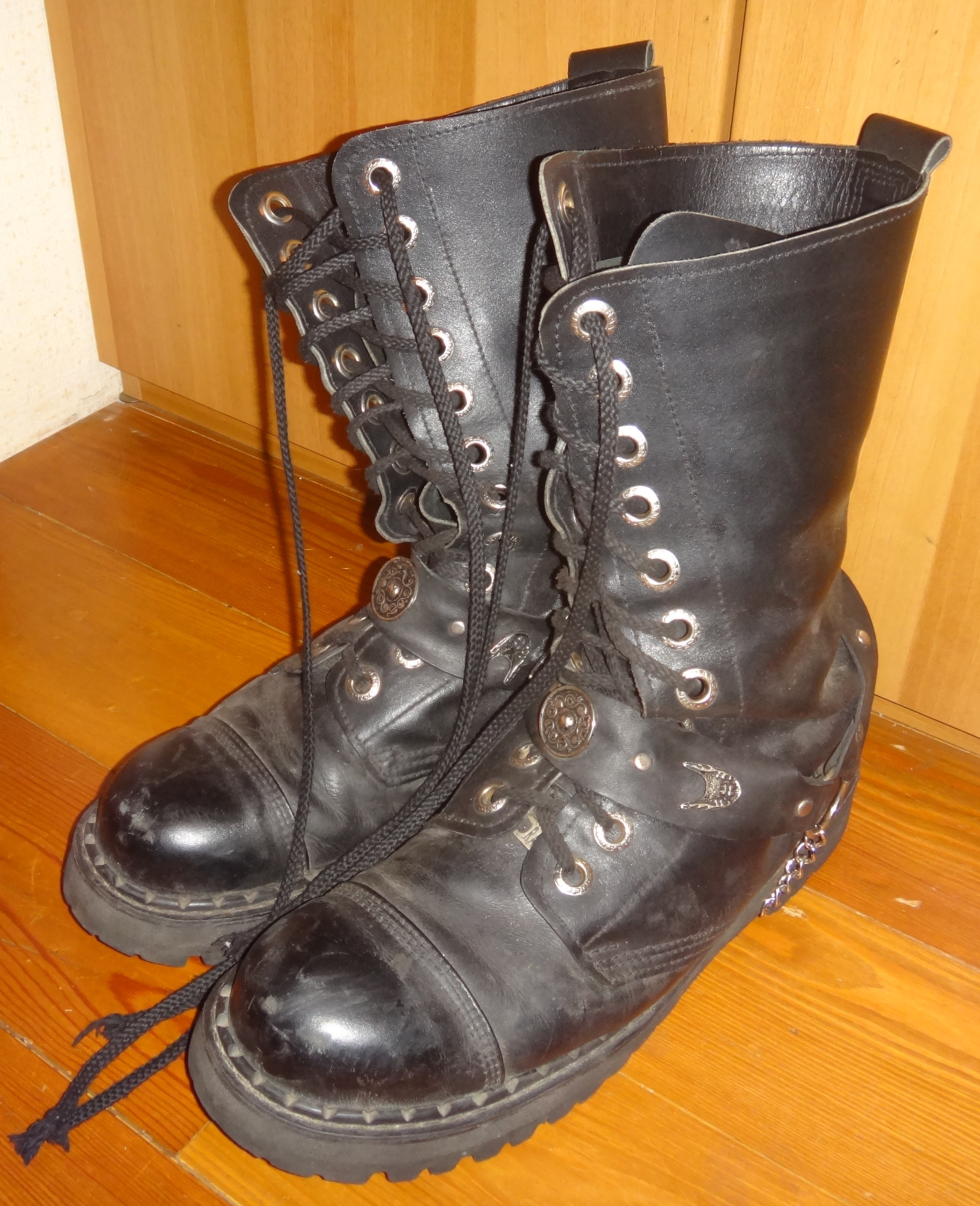 Берцы-«гады» со шпорами от ботинков-«казаков»